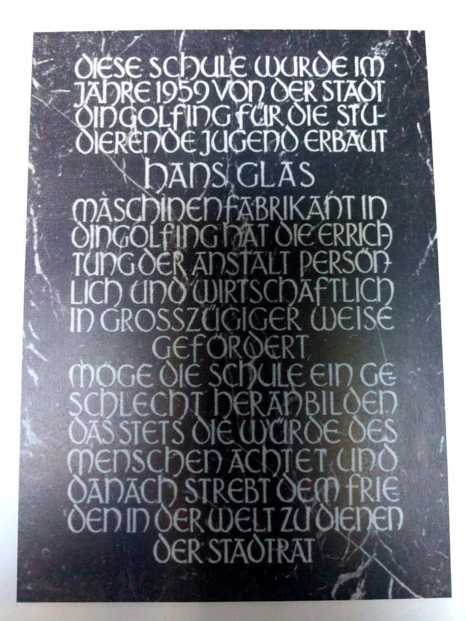 Befindet sich im ersten eigenen Gebäude des Gymnasium Dingolfing, der heutigen Grundschule Altstadt.